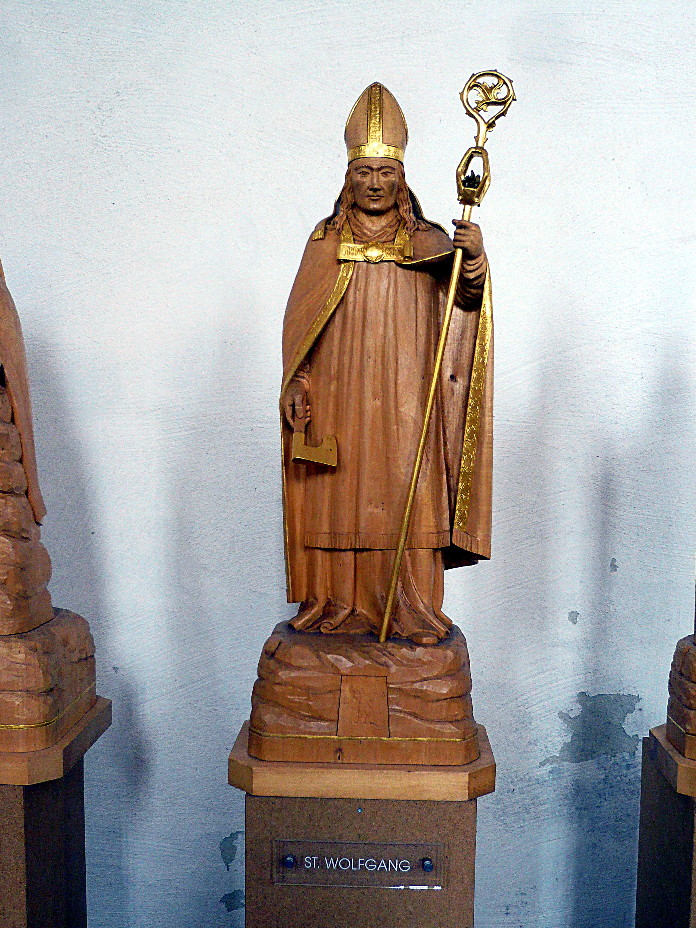 St. Wolfgangs-Kirche, Schneeberg: Heiliger Wolfgang